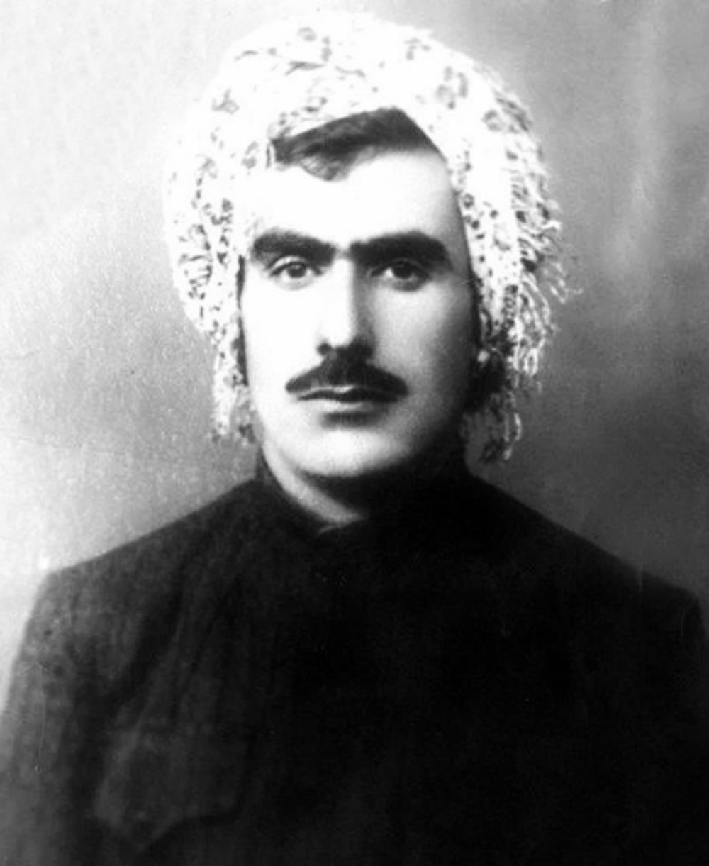 عکسی از عبدالرحمان شرفکندی معروف به ماموستا هژار در اوایل حکومت جمهوری مهاباد